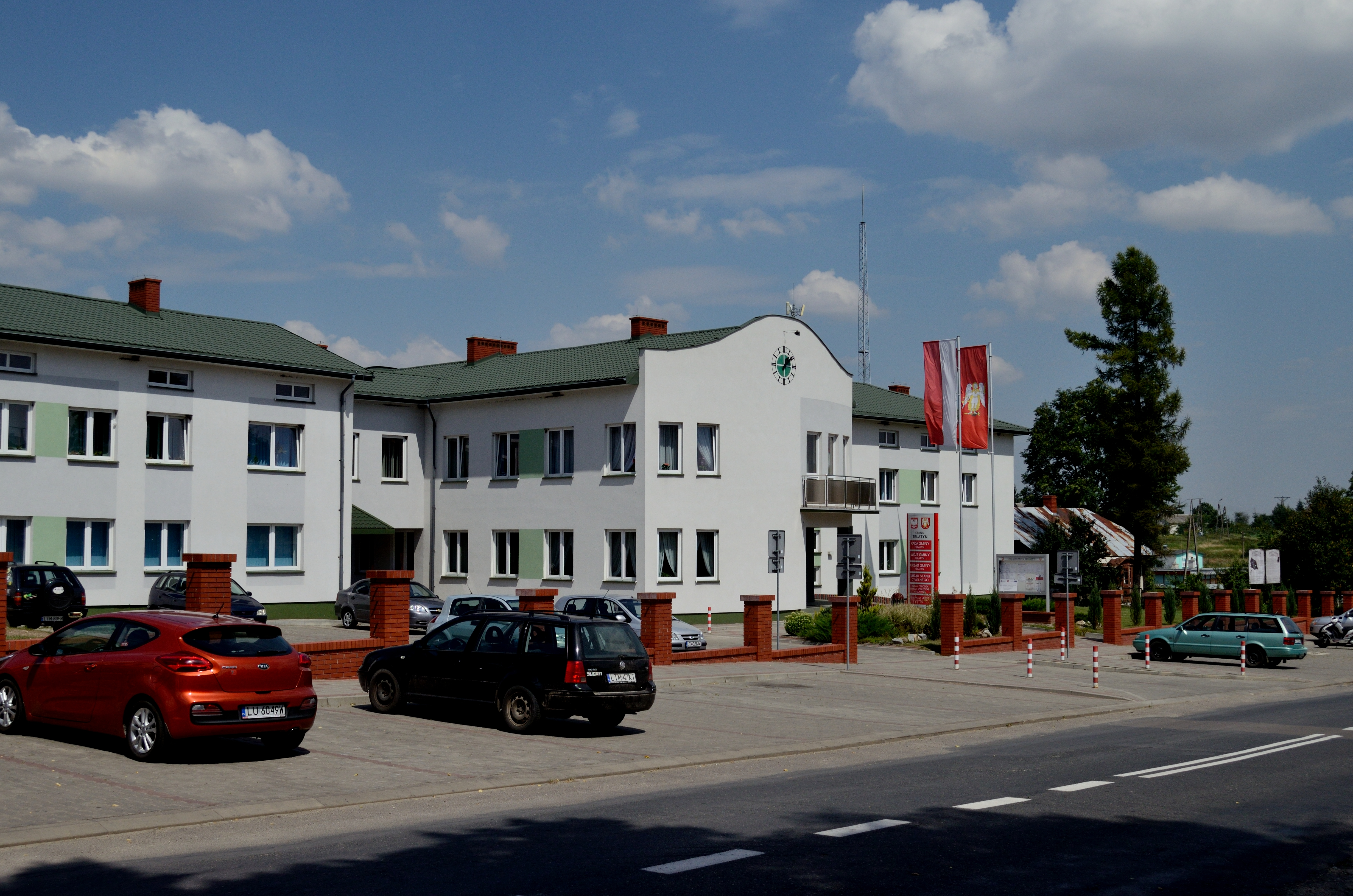 Rada Gminy Telatyn Wójt Gminy Telatyn Urząd Gminy Telatyn Urząd Stanu Cywilnego